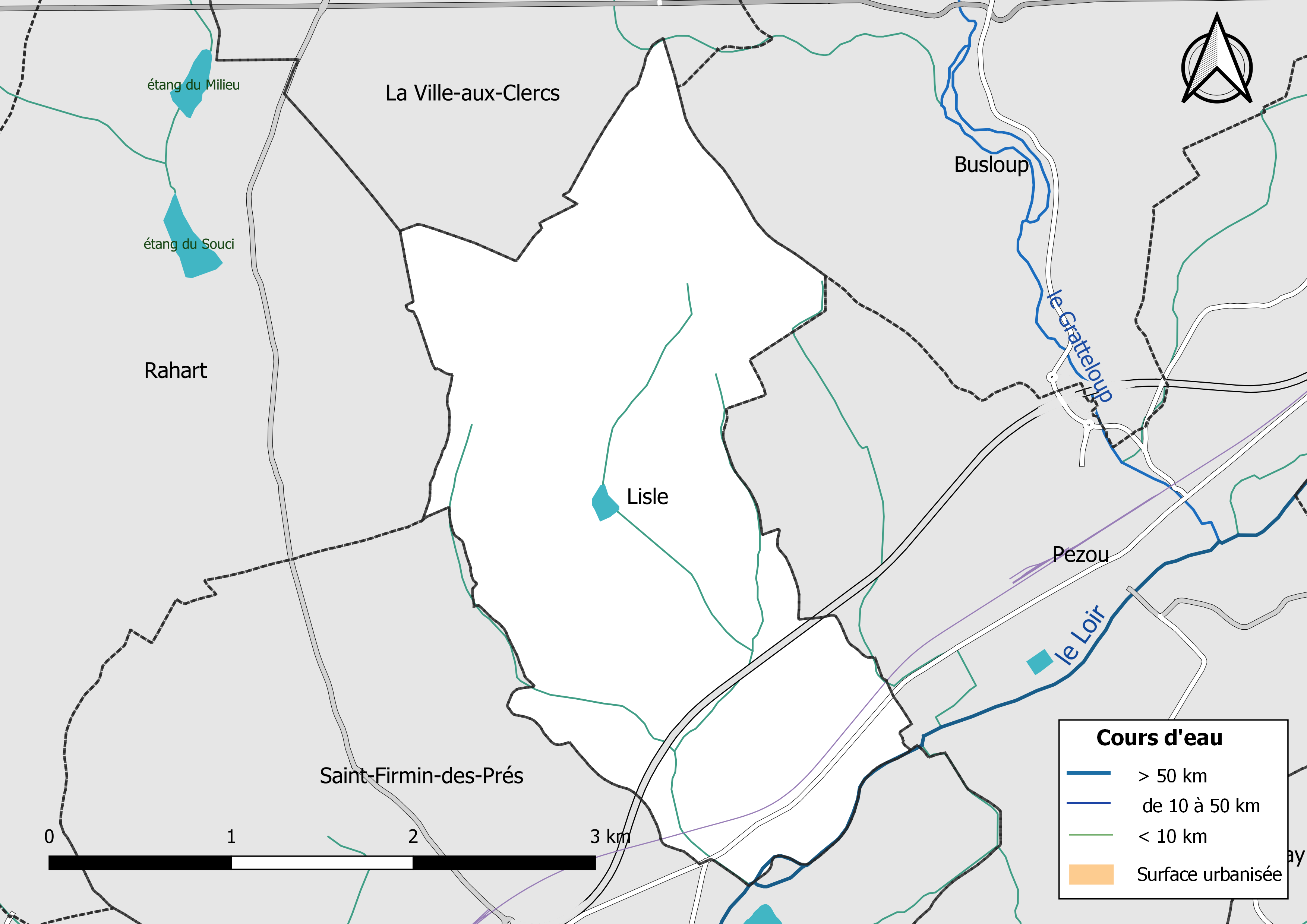 Carte du réseau hydrographique de la commune de Lisle (Loir-et-Cher) (France).